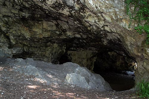 Prähistorische Höhle "Kesslerloch" bei Thayngen (Nr. 03.1-5311)